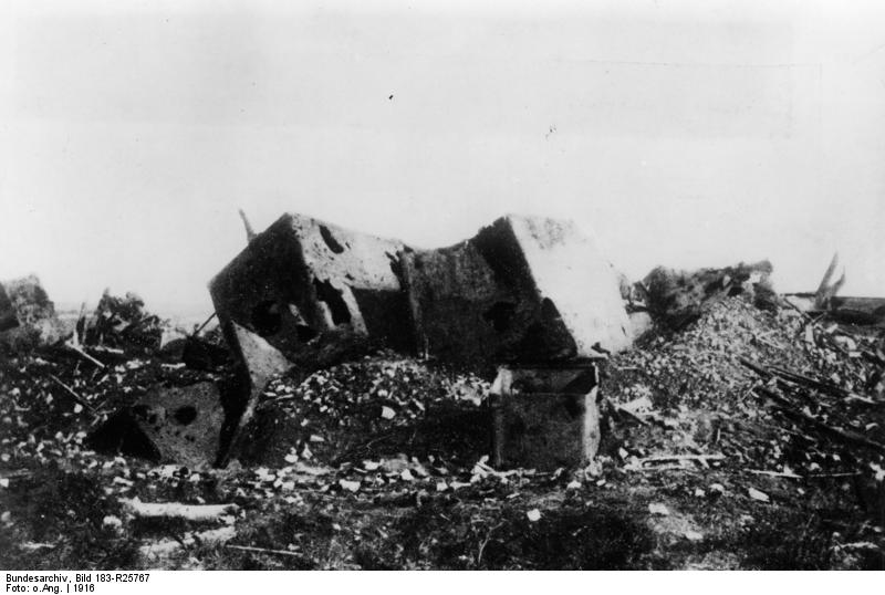 Frankreich, Souchez, zerstörte Zuckerfabrik Weltkrieg. 1916. Die Trümmer der Zuckerfabrik von Souchez. R. 25767/714-16 Information added by Wikimedia users.